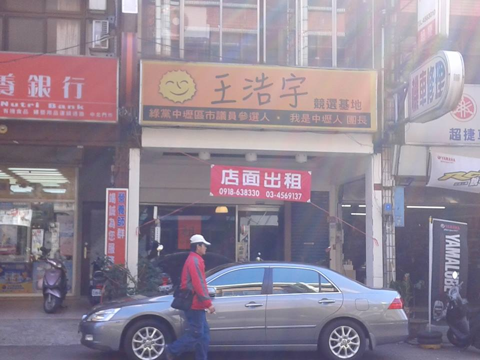 中文（台灣）: 臺灣綠黨桃園市議員參選人王浩宇競選總部，地址：桃園市中壢區中北路二段430號。